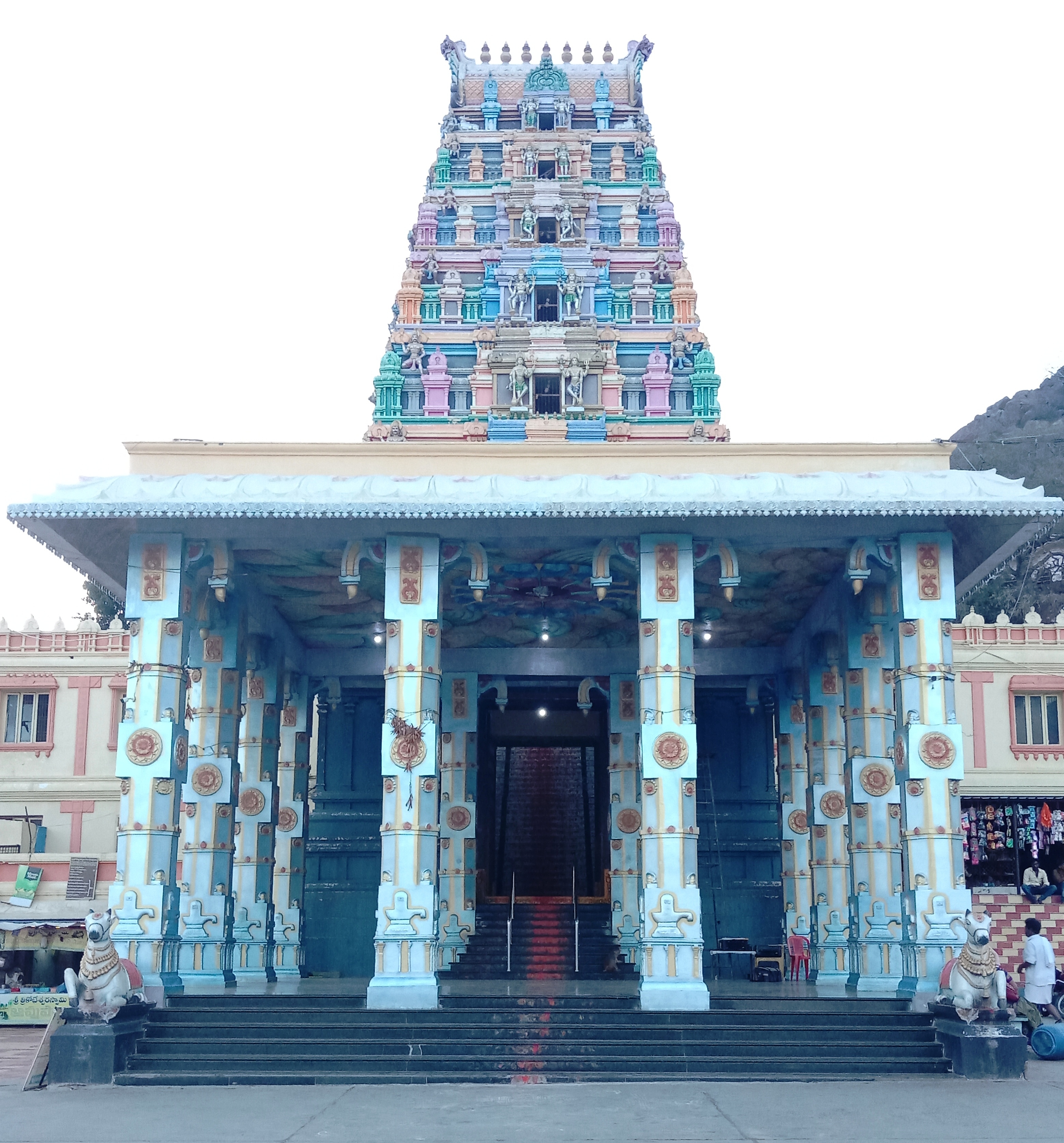 Kotappakonda Temple of the guntur district,in narasaraopet mandal